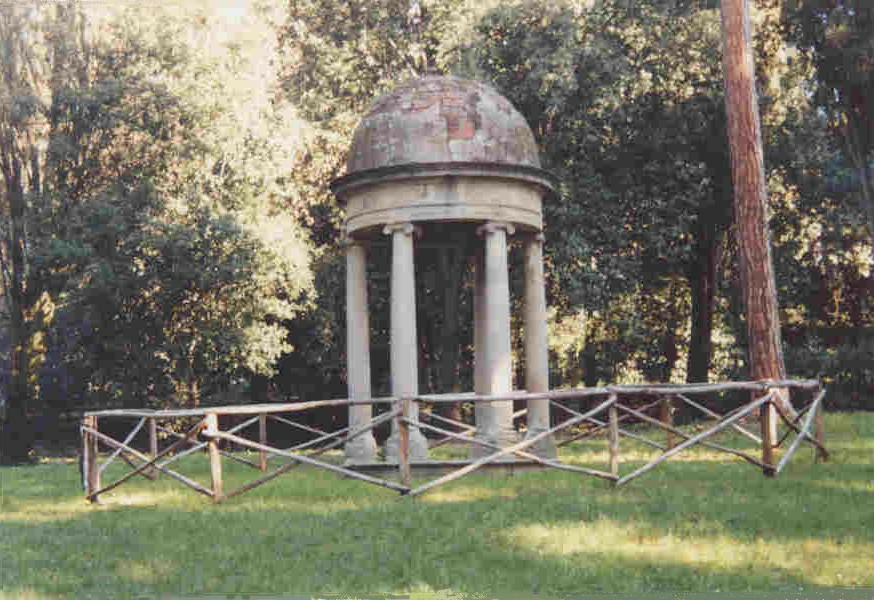 Tempietto di Villa Fabbricotti, Firenze